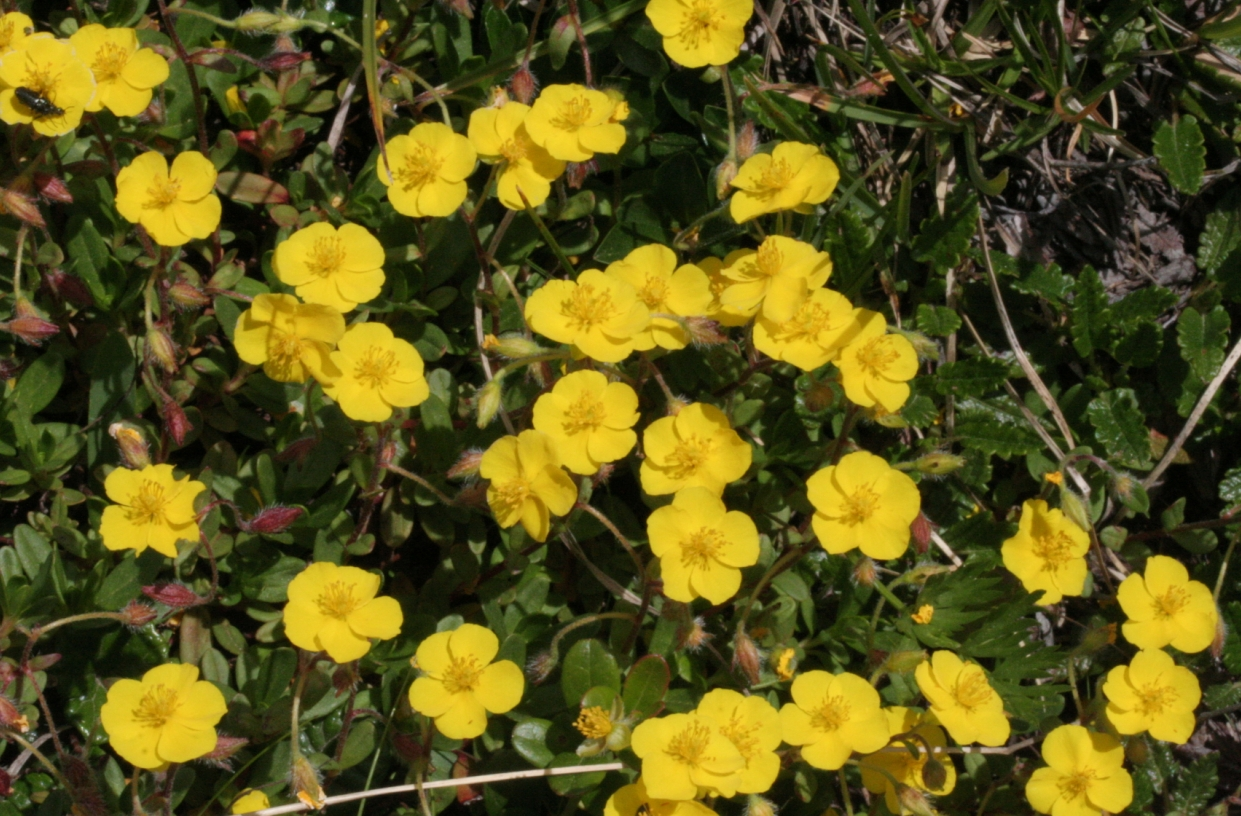 Helianthemum_oelandicum (Eliantemo rupino) Località : Passo di Falzarego, Cortina (BL), 2105 m s.l.m.